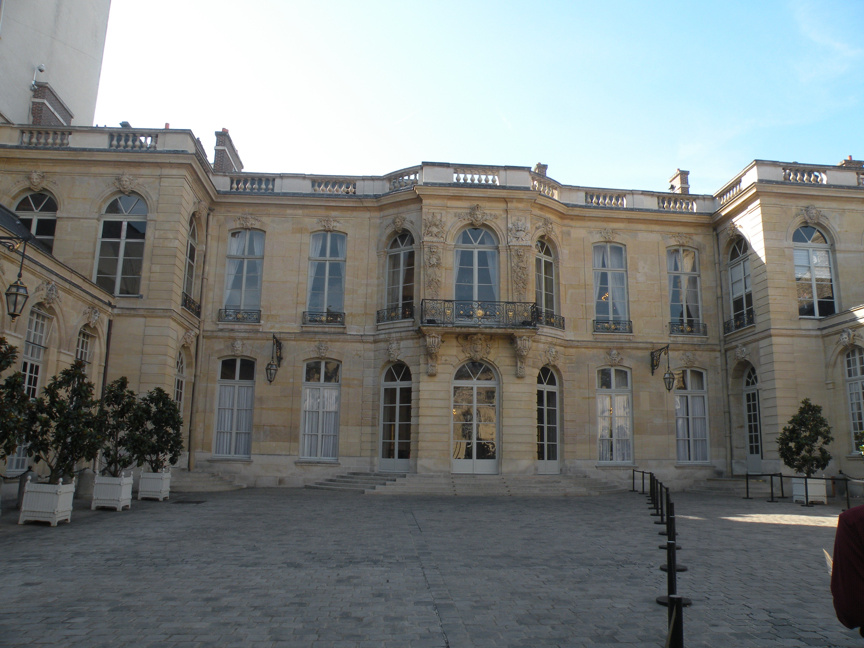 Grande cour de l'Hôtel Matignon